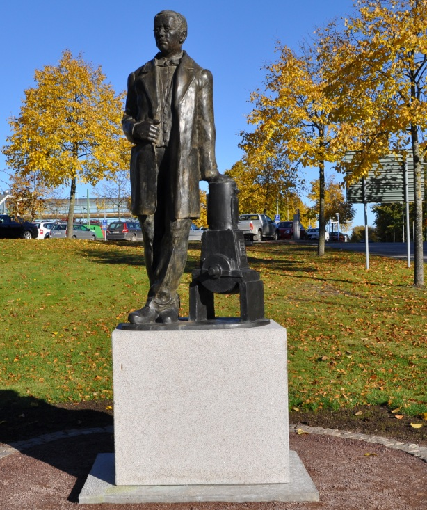 Sköfde Mekansika grundare John G Grönvall